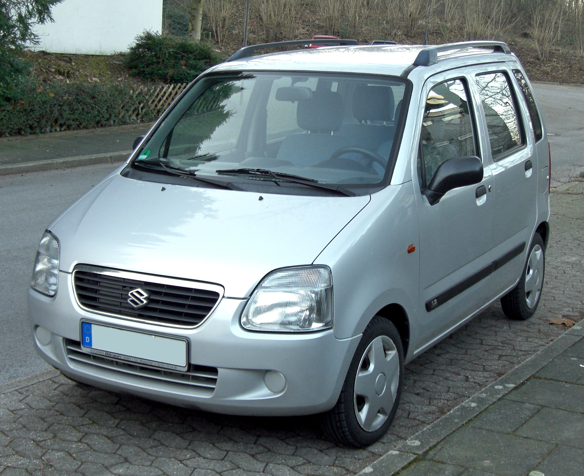 Suzuki R+ front